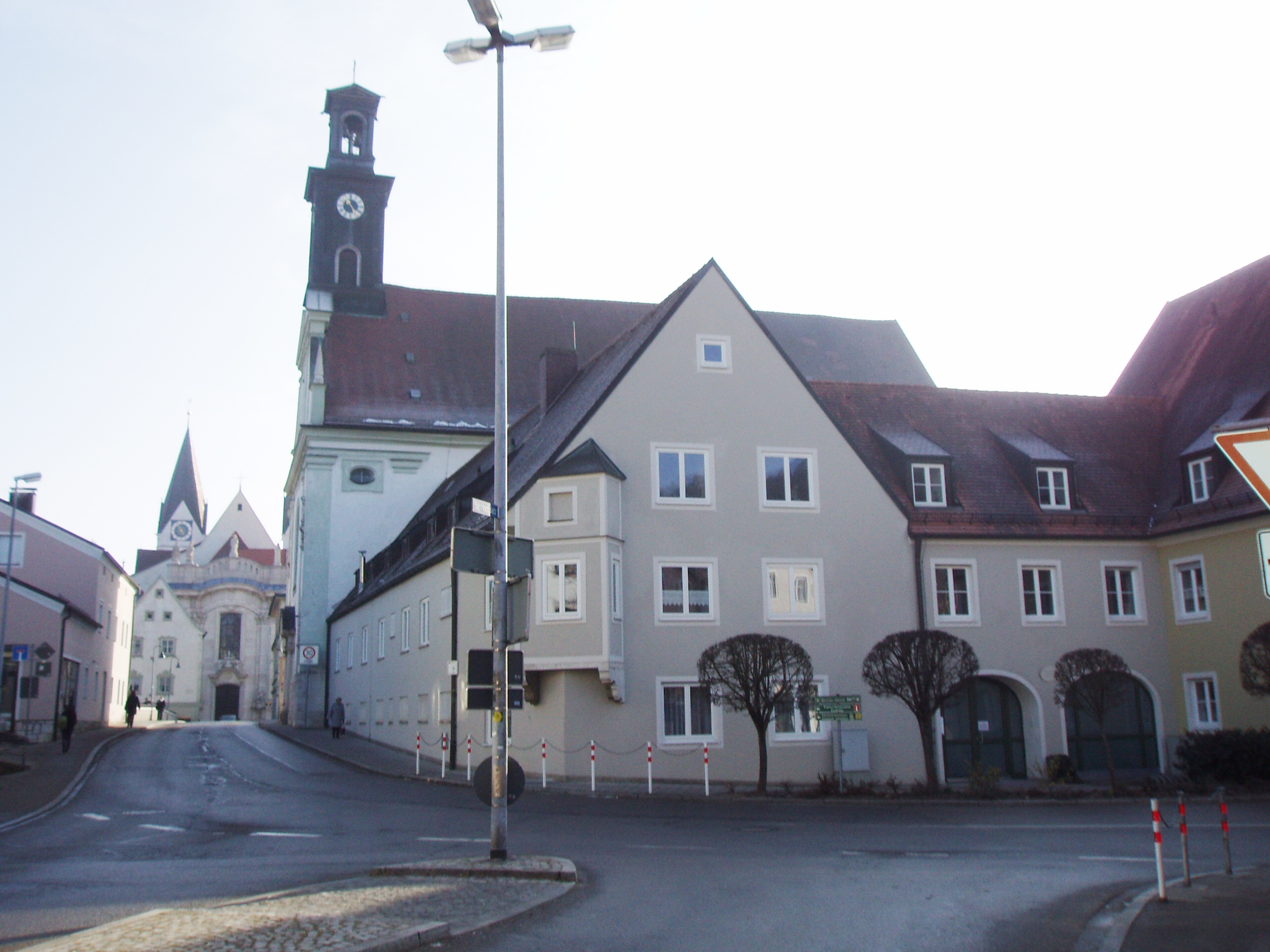 Eichstätt, Heilig-Geist-Spital am Bahnhofplatz